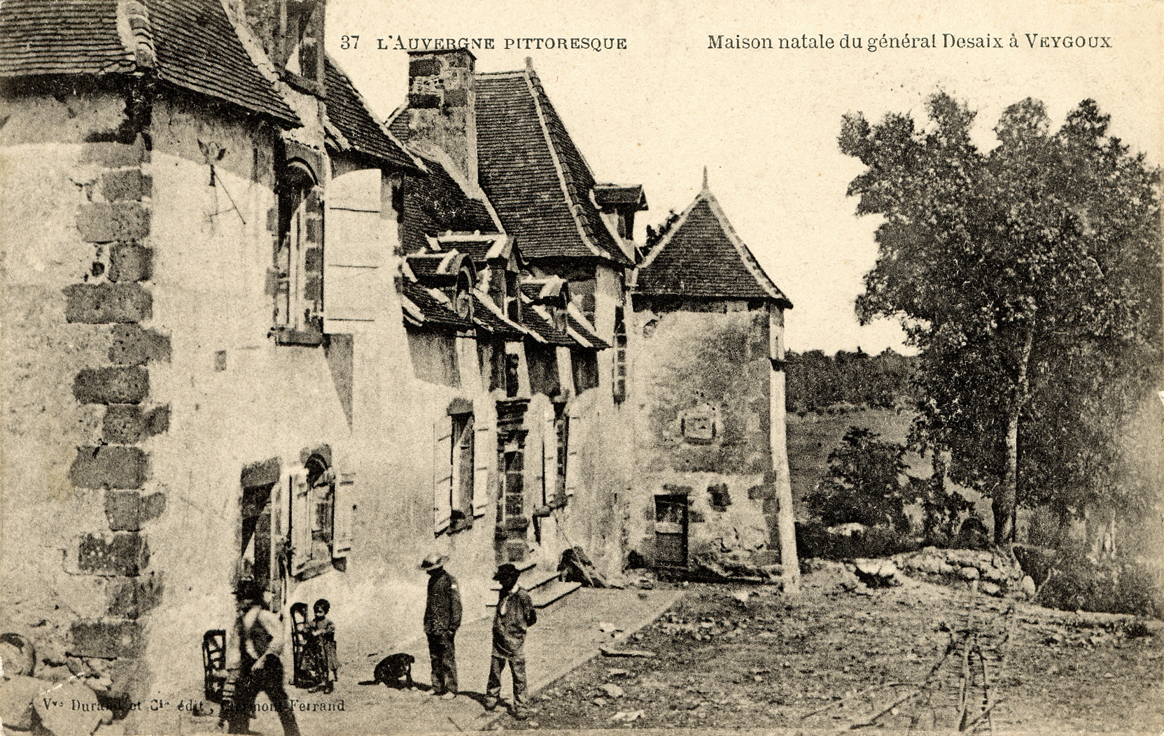 Carte postale ancienne représentant le manoir de Veygoux, demeure natale du Général Desaix.